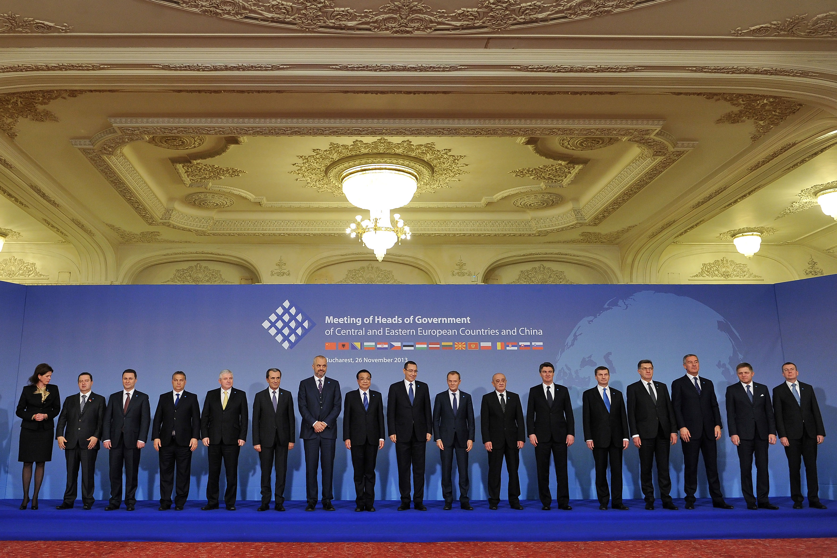 Victor Ponta la Summit-ul Premierilor din Europa Centrala si de Est - China, Bucuresti